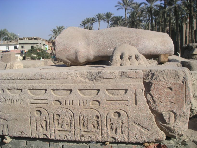 Fragments d'une statue colossale de Ramsès II placée devant le pylône de la grande salle hypostyle du temple de Ptah à Memphis - XIXe dynastie égyptienne - Mit Rahineh